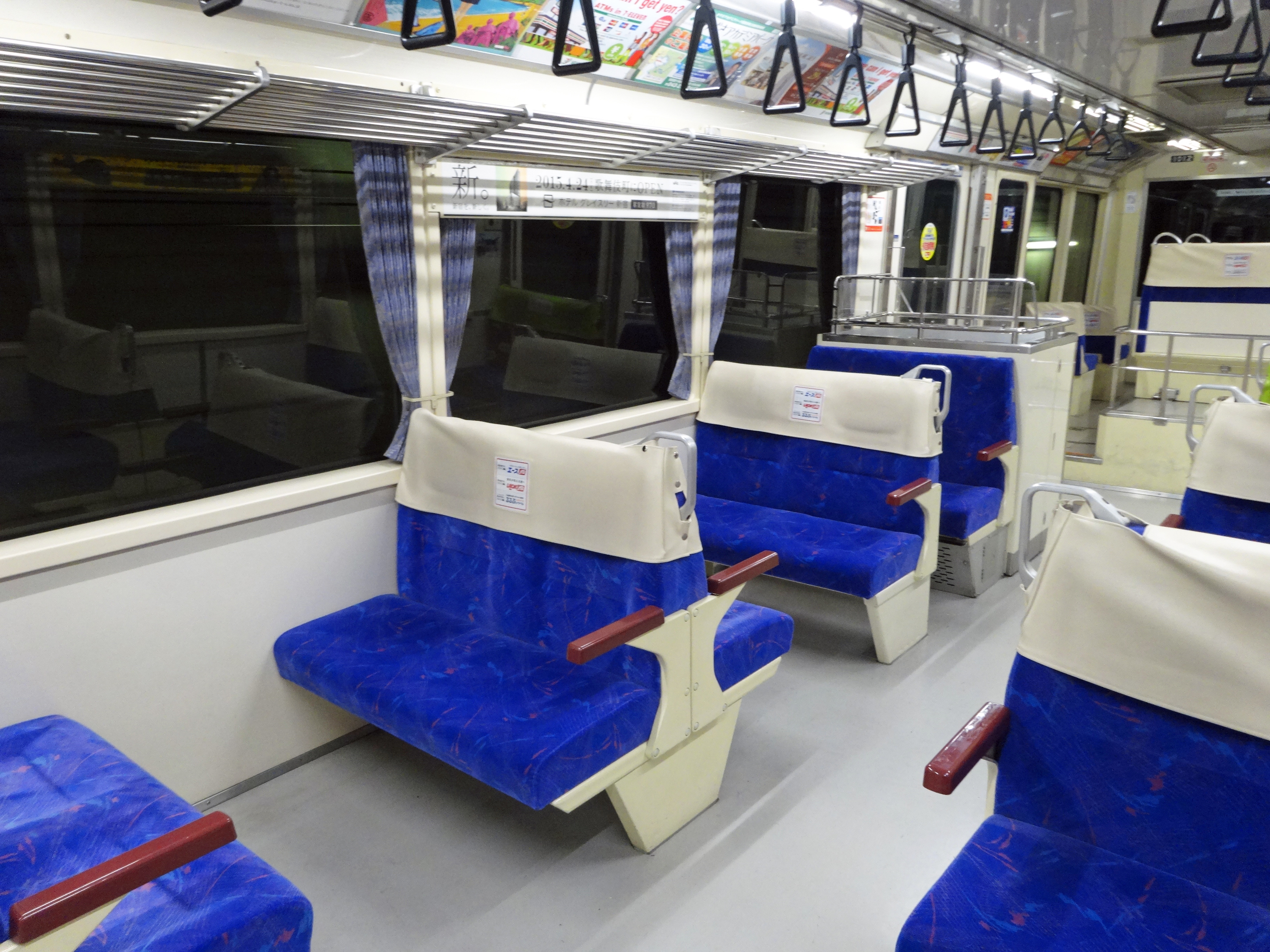 東京モノレール1000形（1012）車内座席（営業列車）